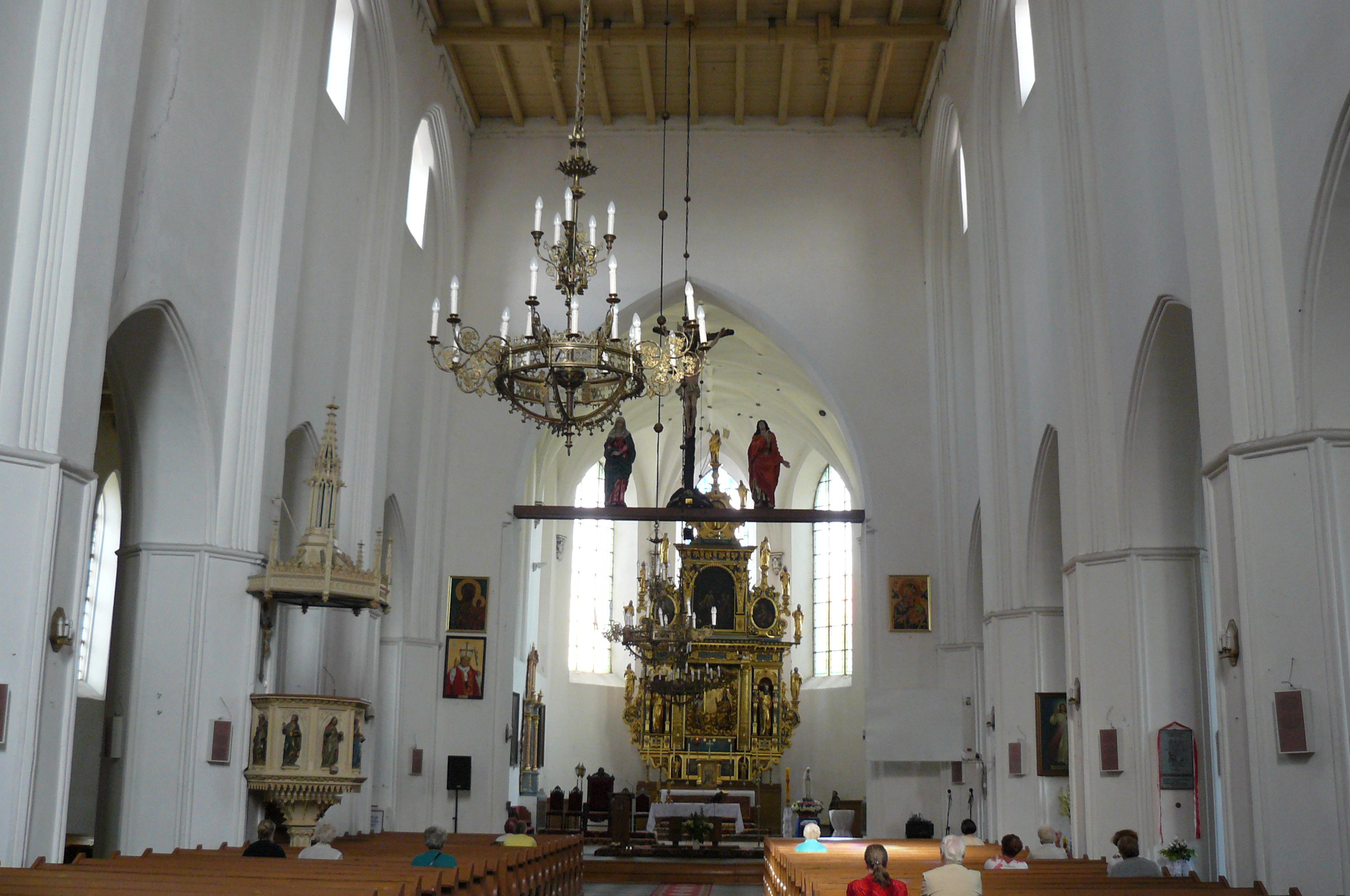 Kolegiata Żuławska w Nw. Stawie.